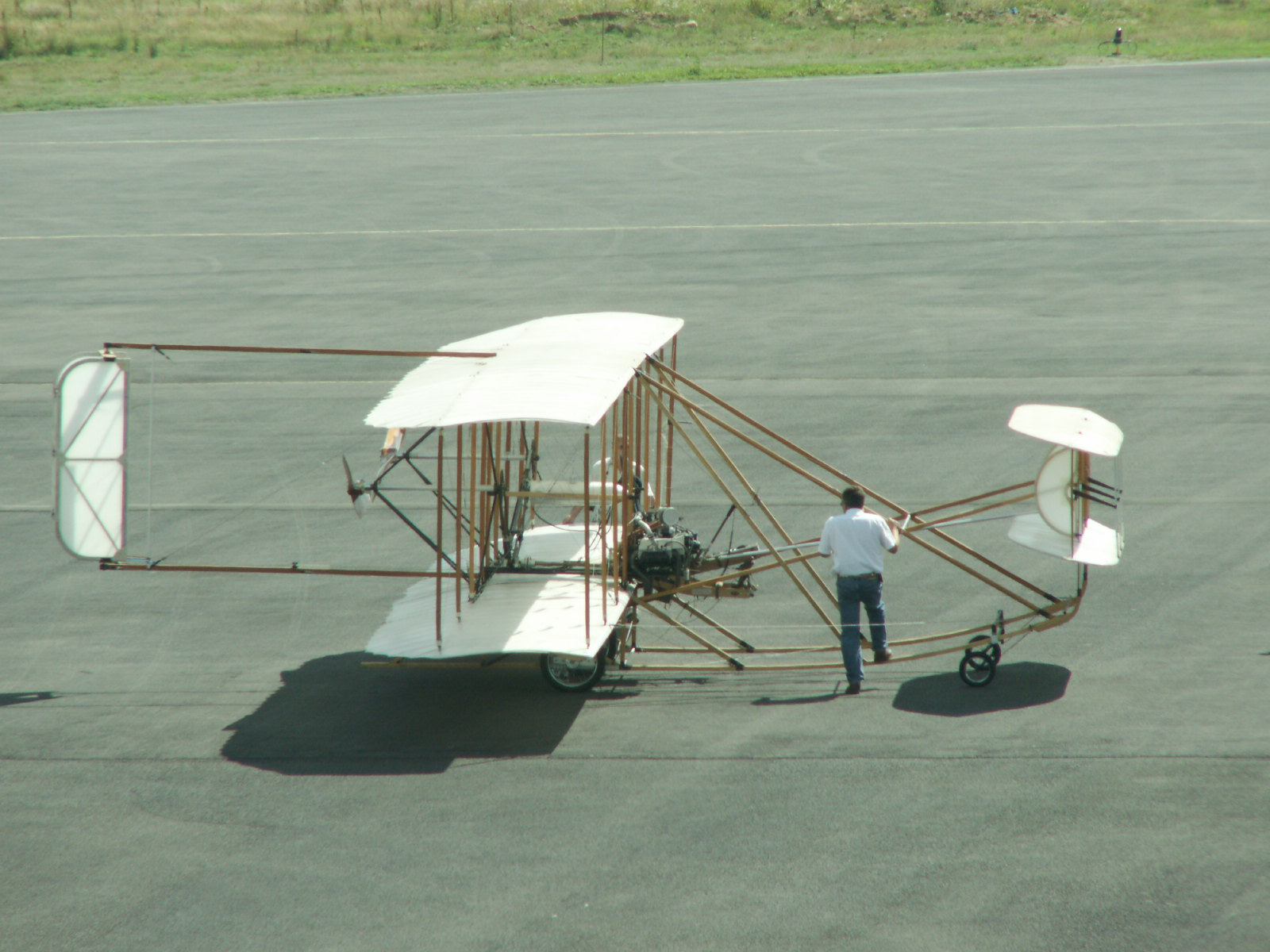 exposition statique flyer